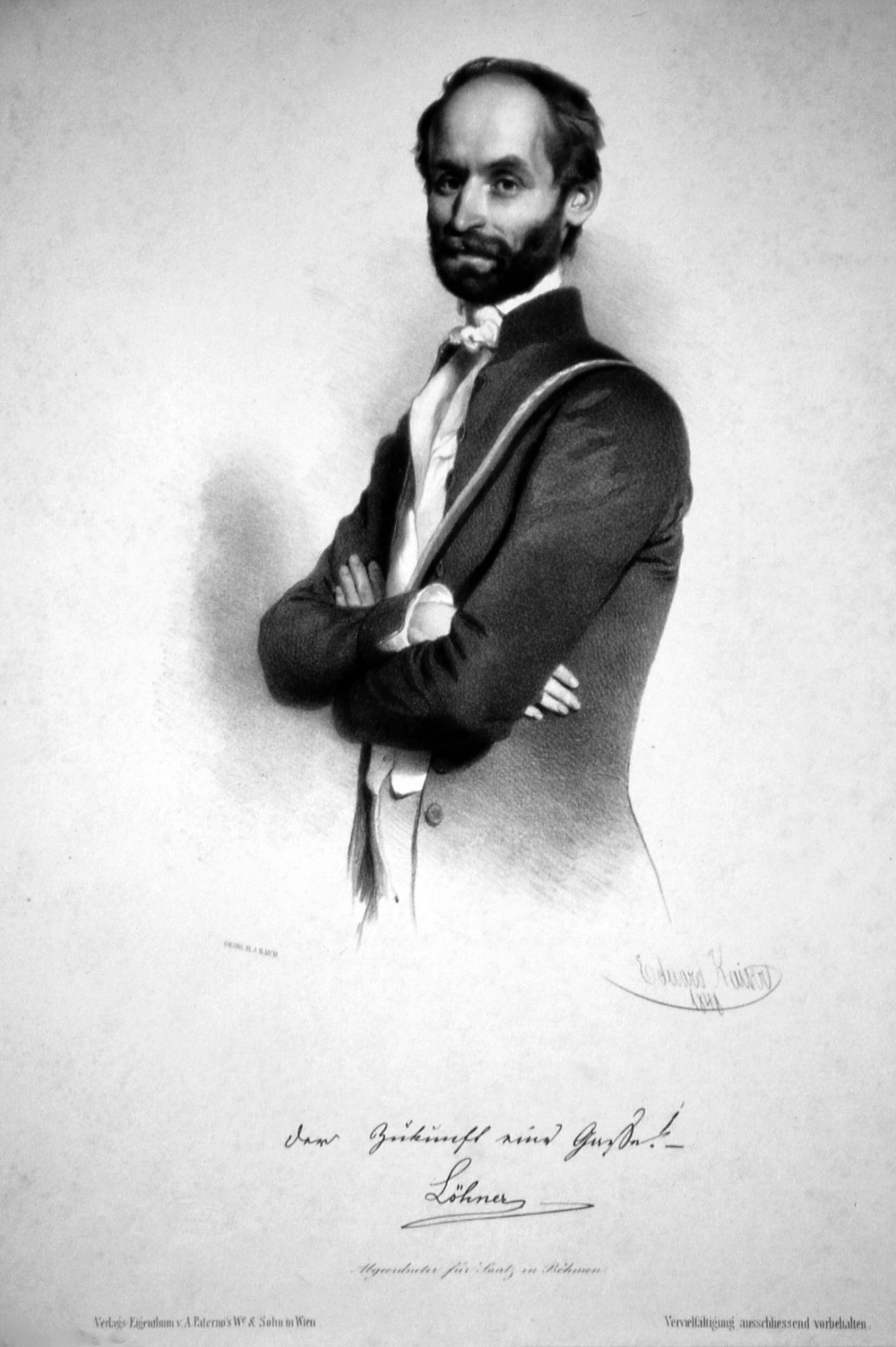 Ludwig von Löhner (1812.1856) österreichischer Arzt, Abgeordneter und Dichter. Lithographie von Eduard Kaiser,1848